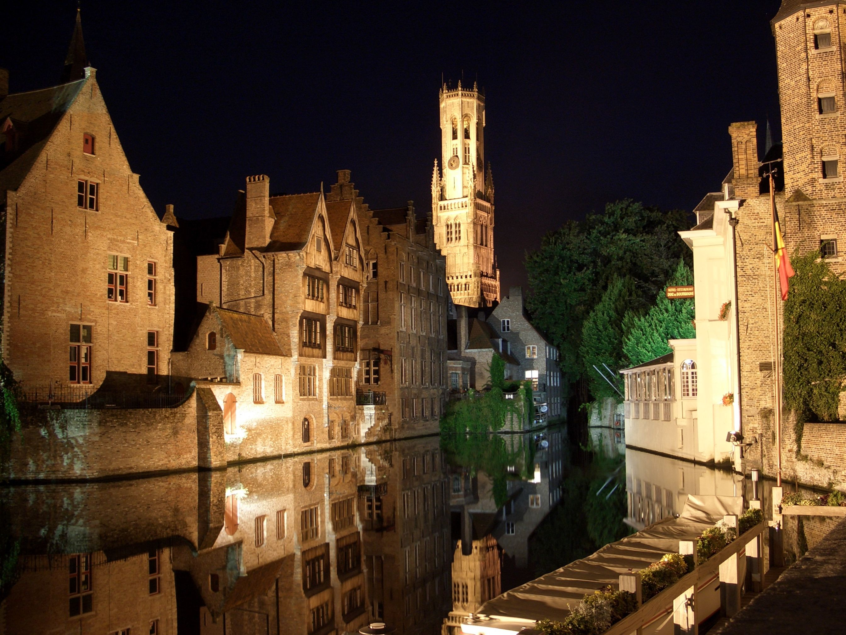 Bruges -Quai Rozenhoed